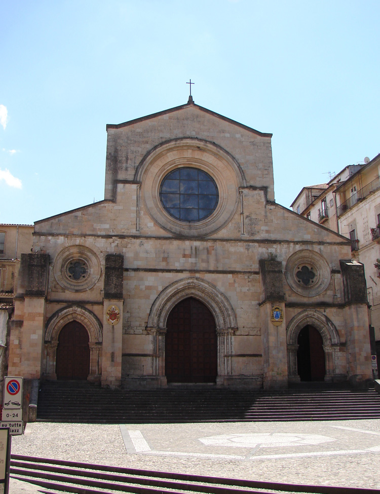 Duomo di Cosenza